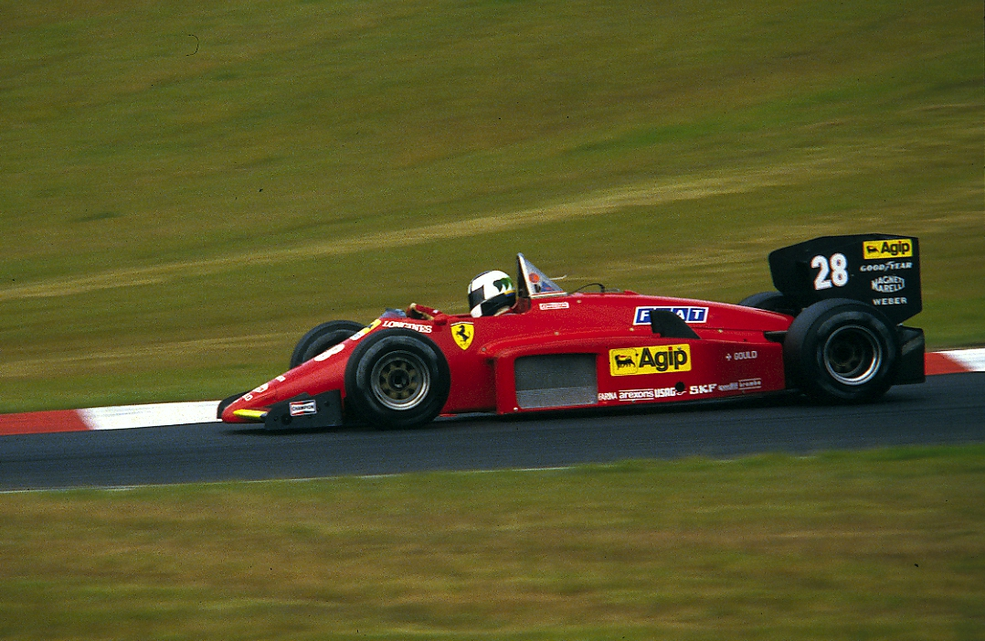 Stefan Johansson im Training zum Großen Preis von Deutschland 1985 auf dem Nürburgring, Ferrari 156/85